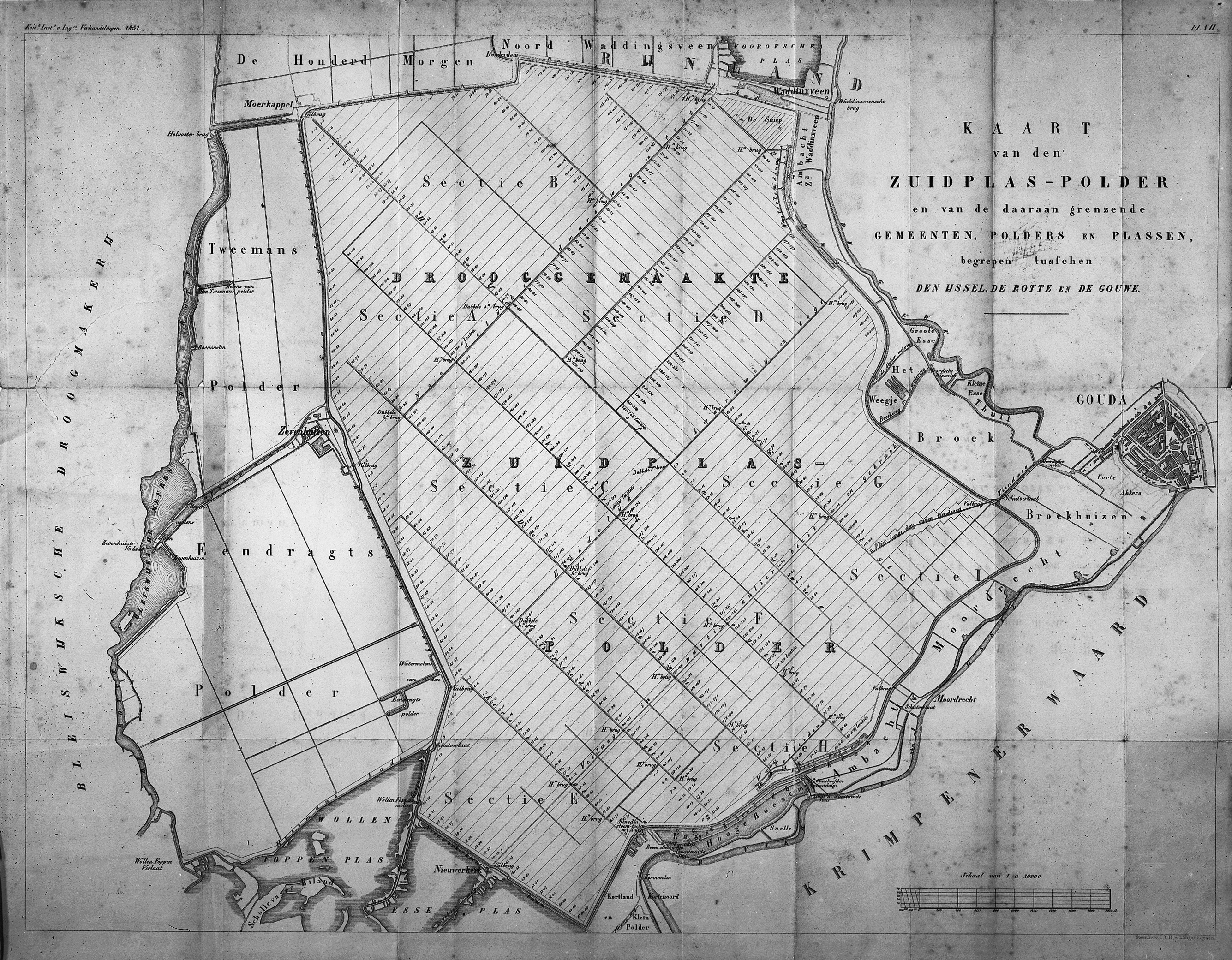 Vijzelmolen H van de Zuidplaspolder: Kaart van de Zuidplaspolder (1850)